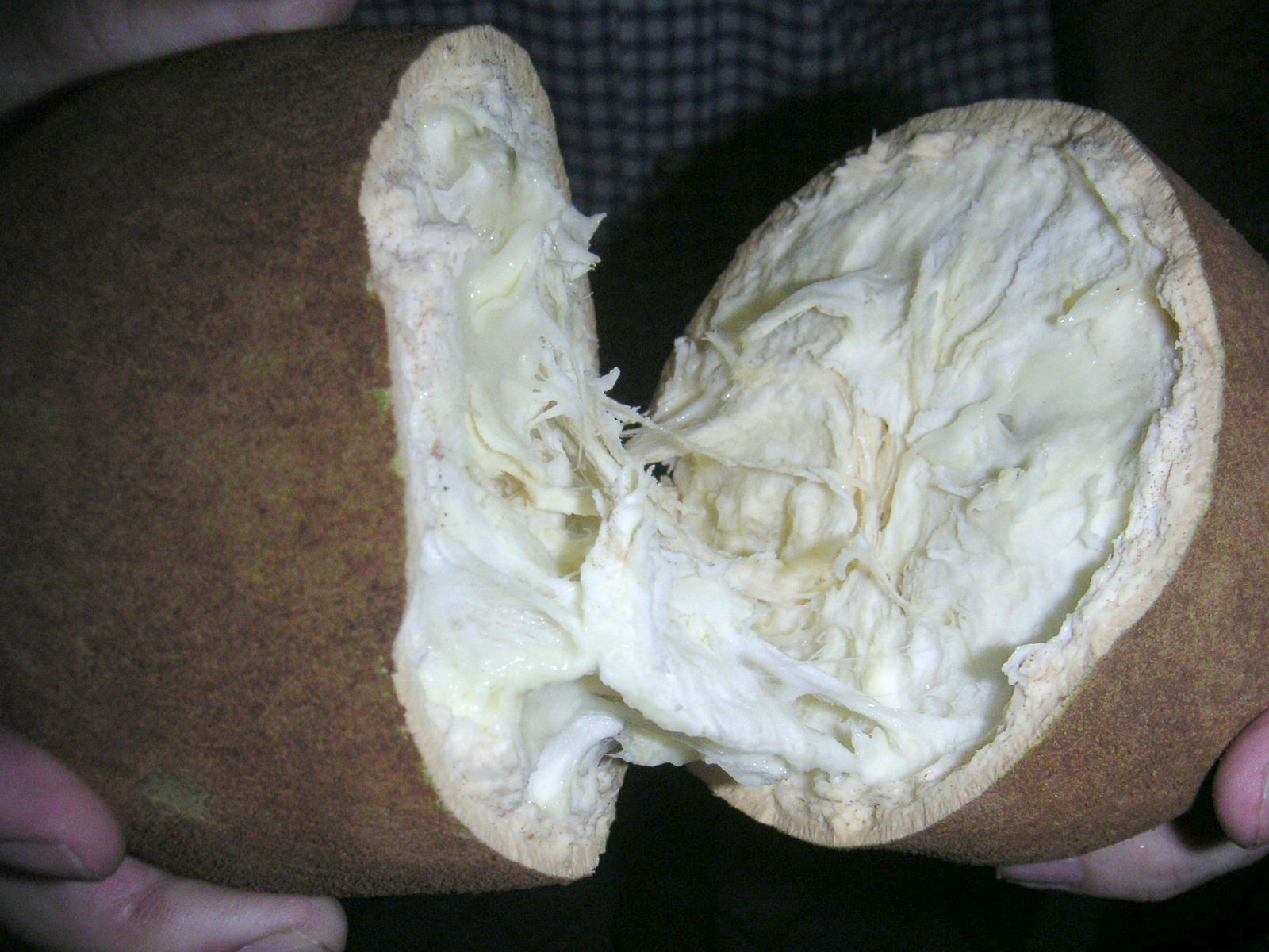 Eine geöffnete Cupuacu Frucht